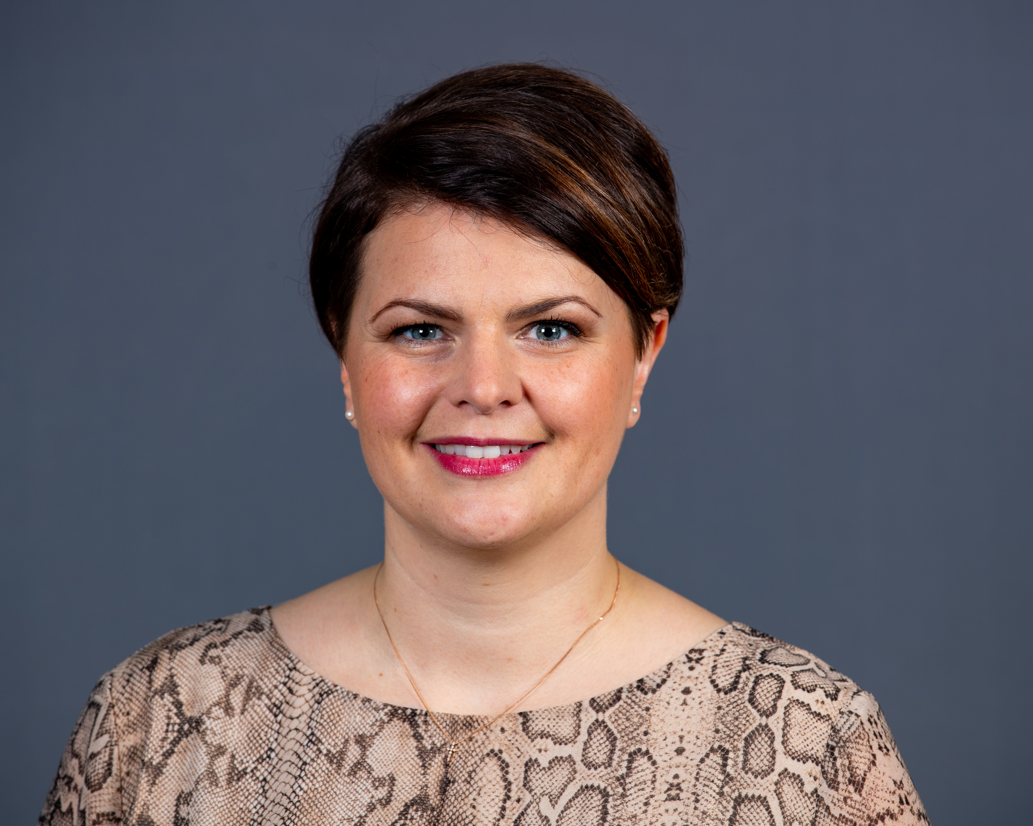 Katrin Staffler, CDU